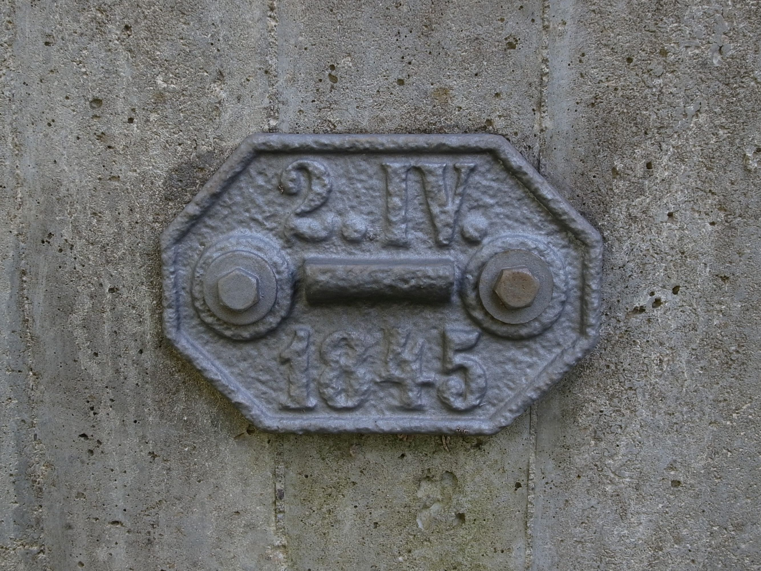 Dessau-Roßlau, Hochwassermarke 2. April 1845 im Stadtgebiet von Dessau. Maße: 150 x 100 x 25 mm (Baudenkmal im Denkmalverzeichniss Sachsen-Anhalt, Erfassungsnummer: 094 40214 000 000 000 000 [1])